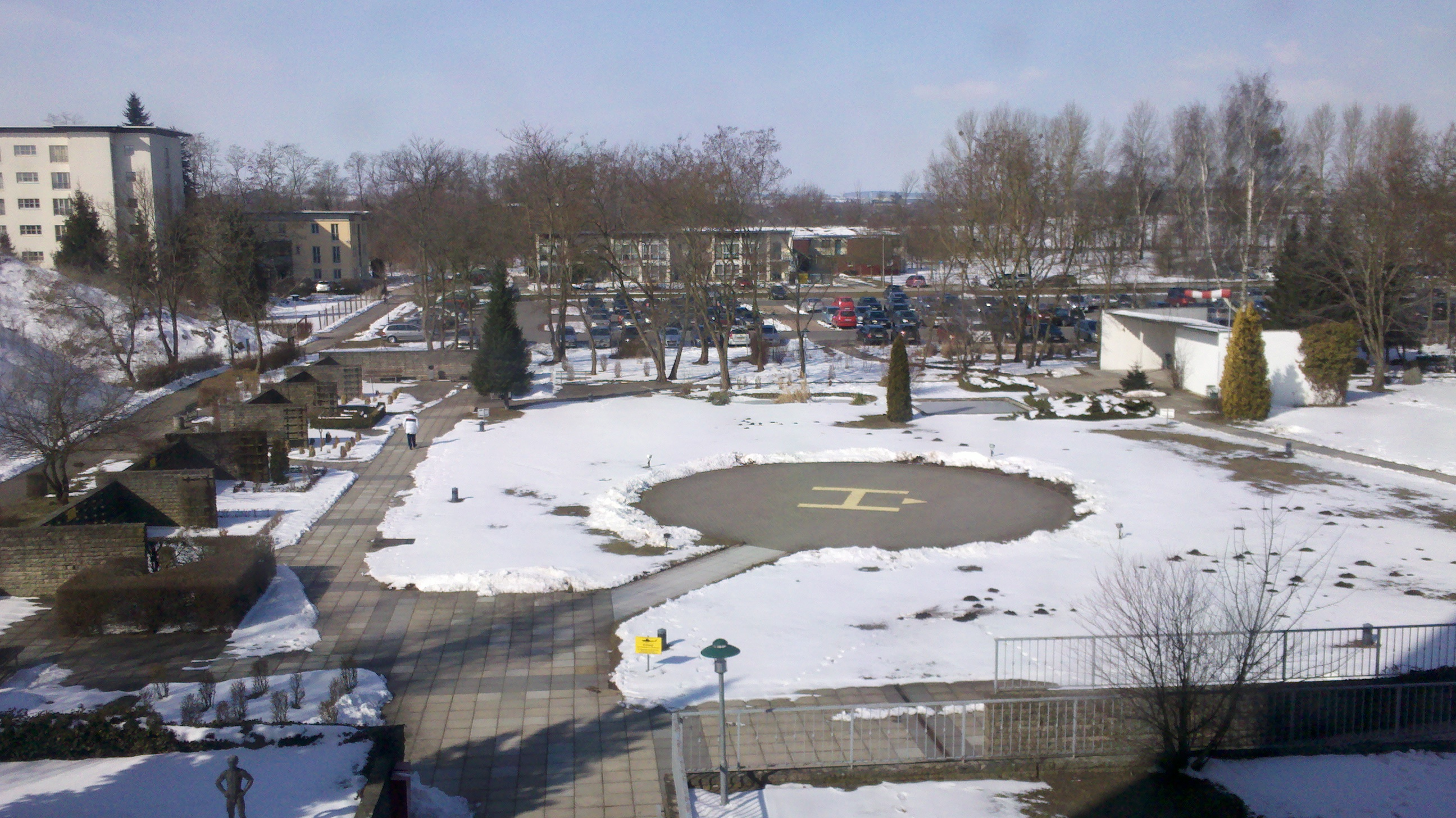 Haupteingang des Asklepios Klinikums Uckermark, Schwedt/Oder, März 2013. Blick vom Klinikhochhaus nach Westen auf den Patientengarten mit Hubschrauberlandeplatz